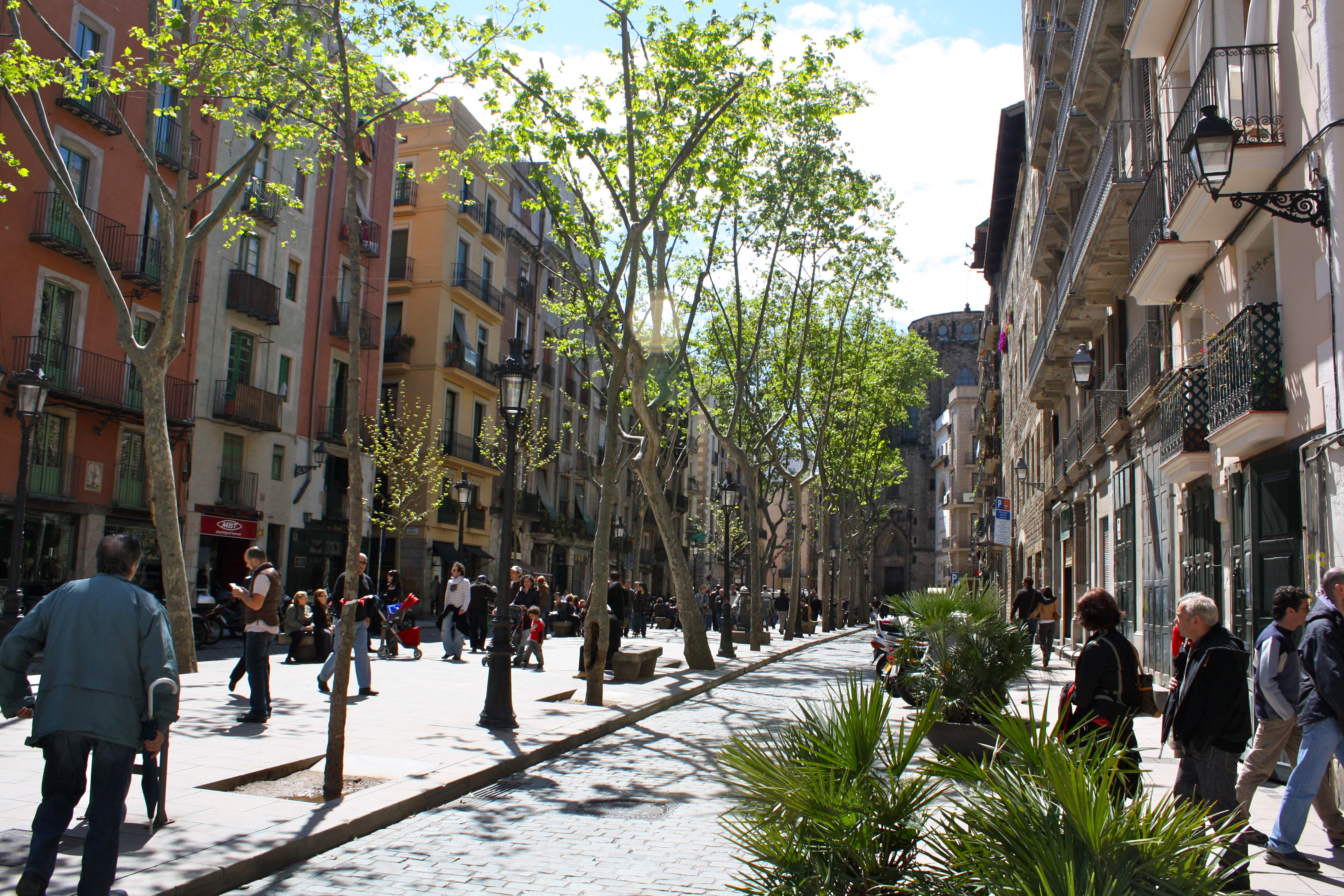 Barcelona Part Deux - 69